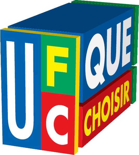 Illustration du logotype de l'sssociation de consommateurs "UFC Que-Choisir"